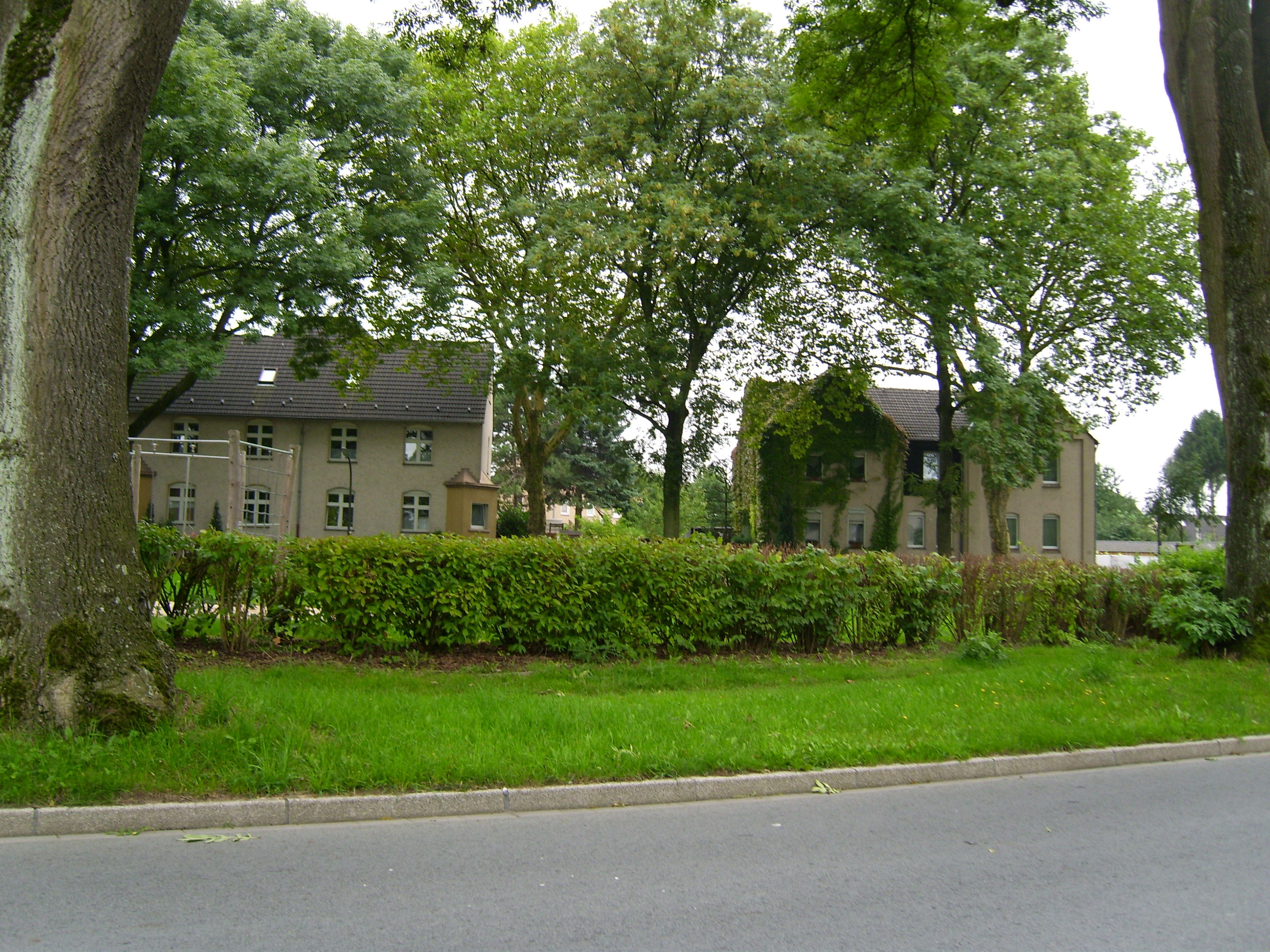 Zechenkolonie am Drissenplatz, Hinsberg im Recklinghäuser Ostviertel, erbaut um 1900